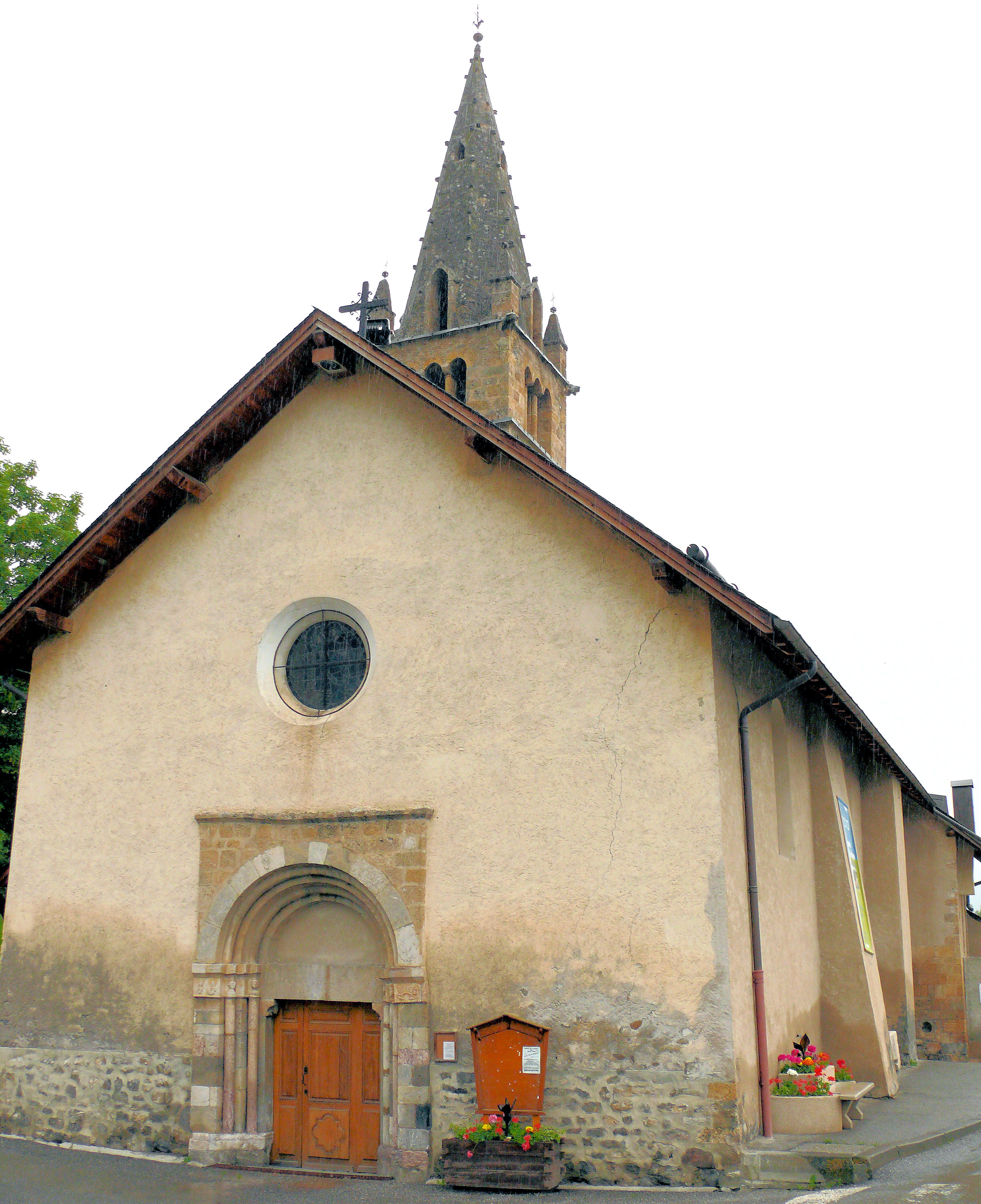 Église Saint-Pons à Saint-Pons (Alpes-de-Haute-Provence) .